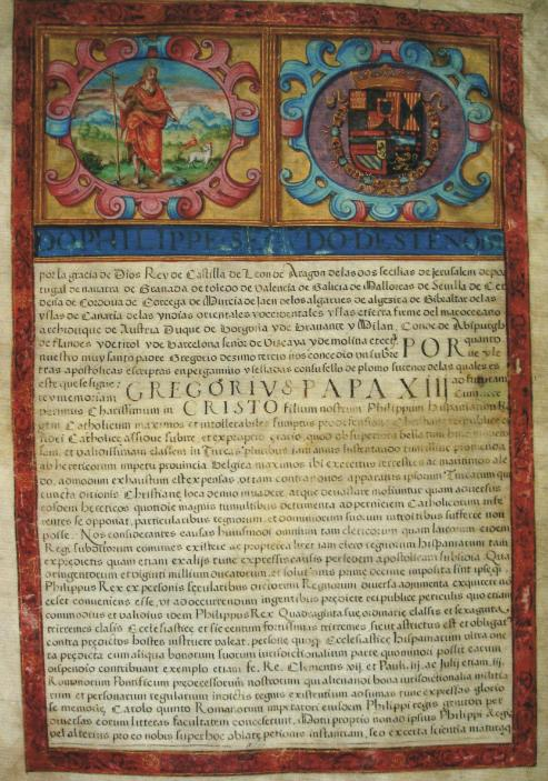 Carta de Felipe II donde conce a Arganda jurisdiccion real y la condicion de villa de realengo, 12 de Marzo de 1583